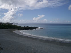 蘭嶼八代灣。